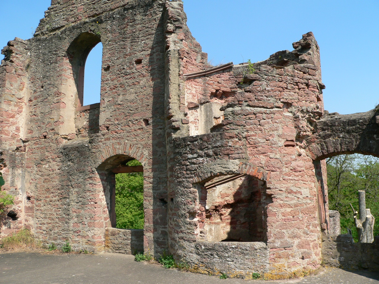 Collenburg oberhalb von Collenberg am Main, Germany - Palas-Südseite mit Rest des Treppenturms